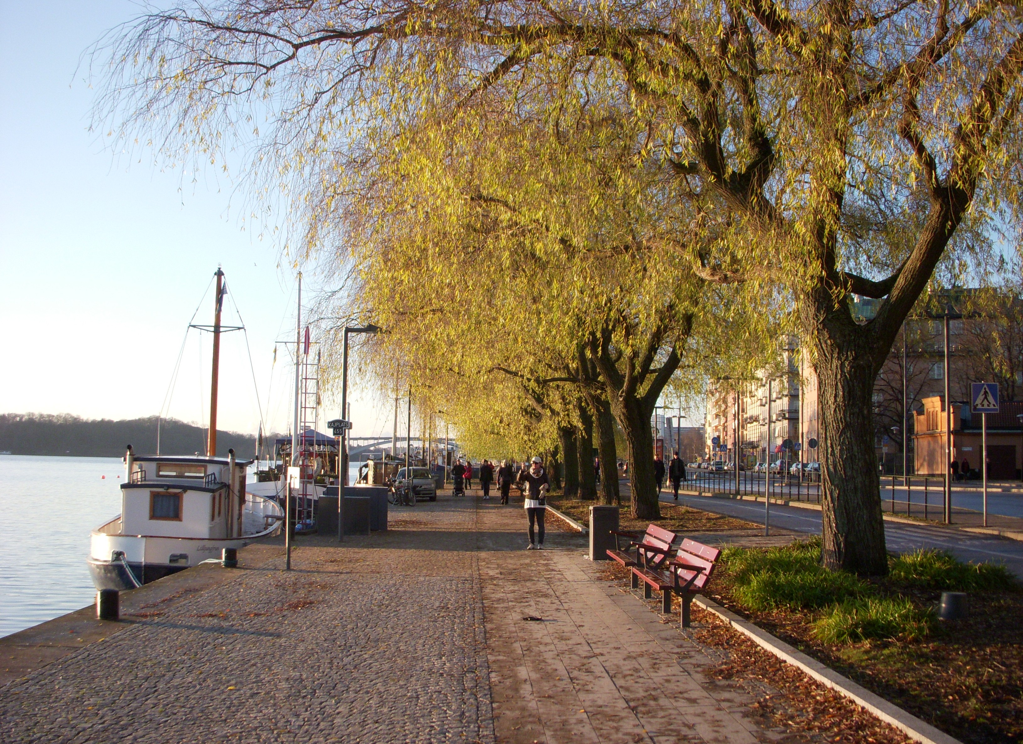 Norr Mälarstrands strandpromenad